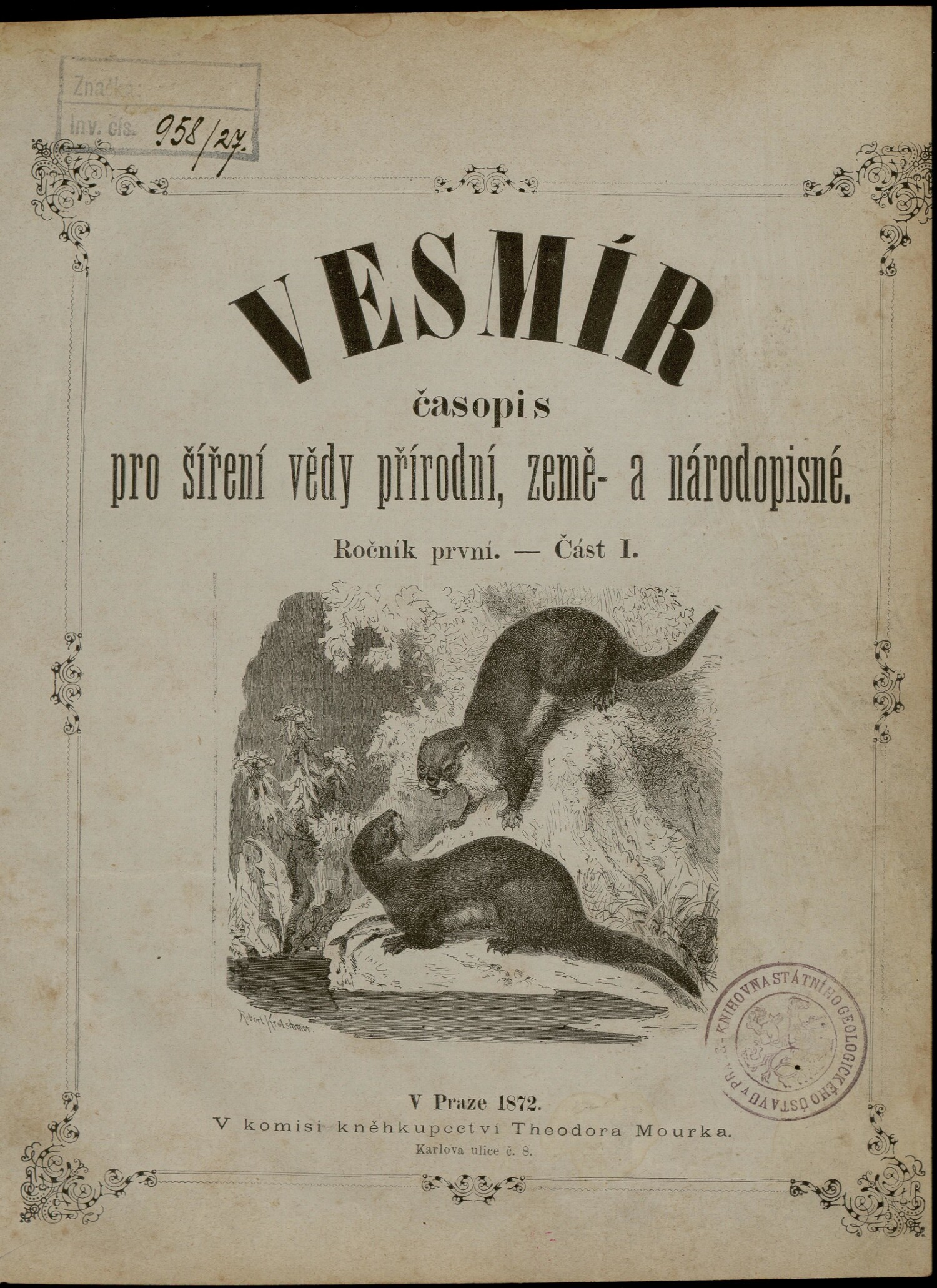 Úvodní strana časopisu Vesmír. Ročník 1., část 1.